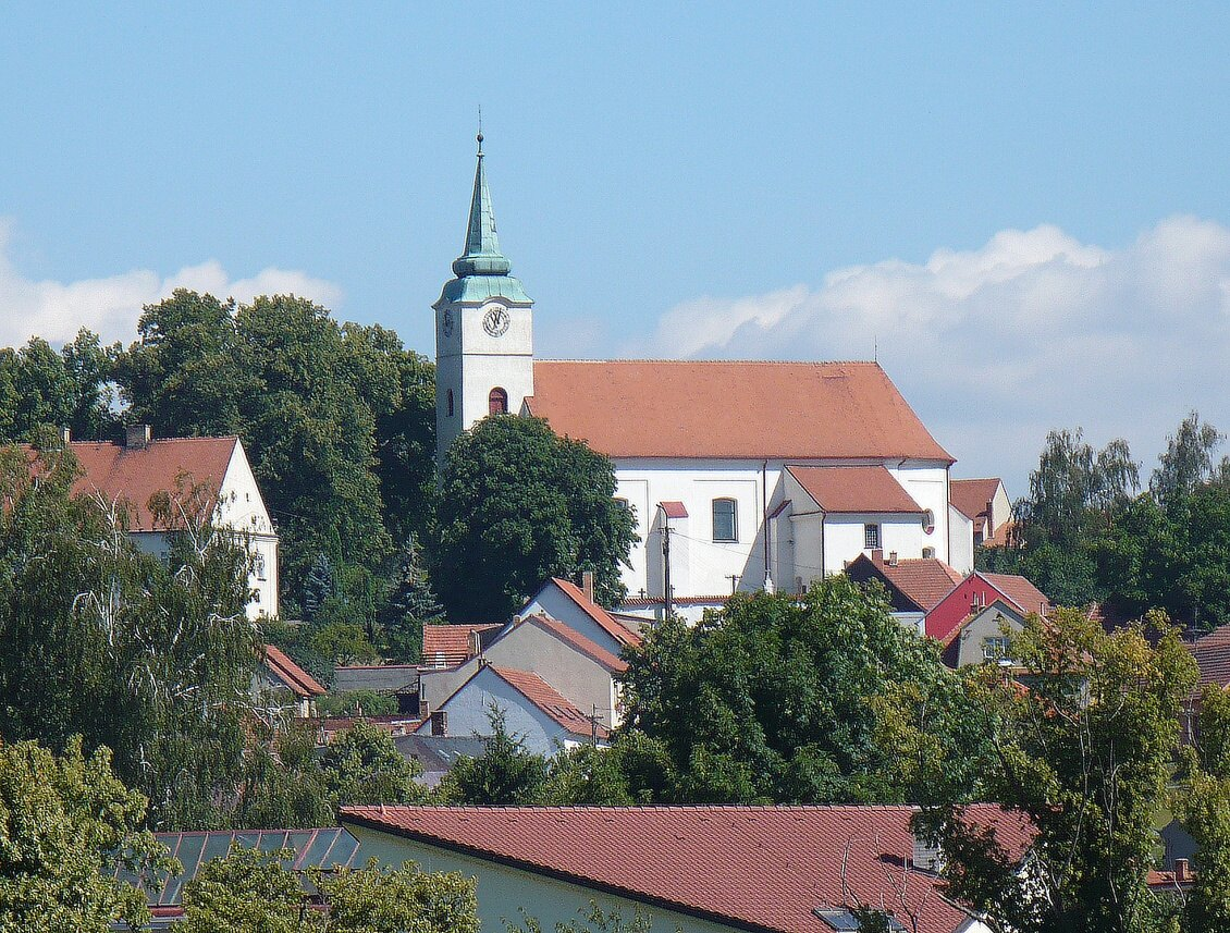 Kostel sv. Petra a Pavla v Jedovnici